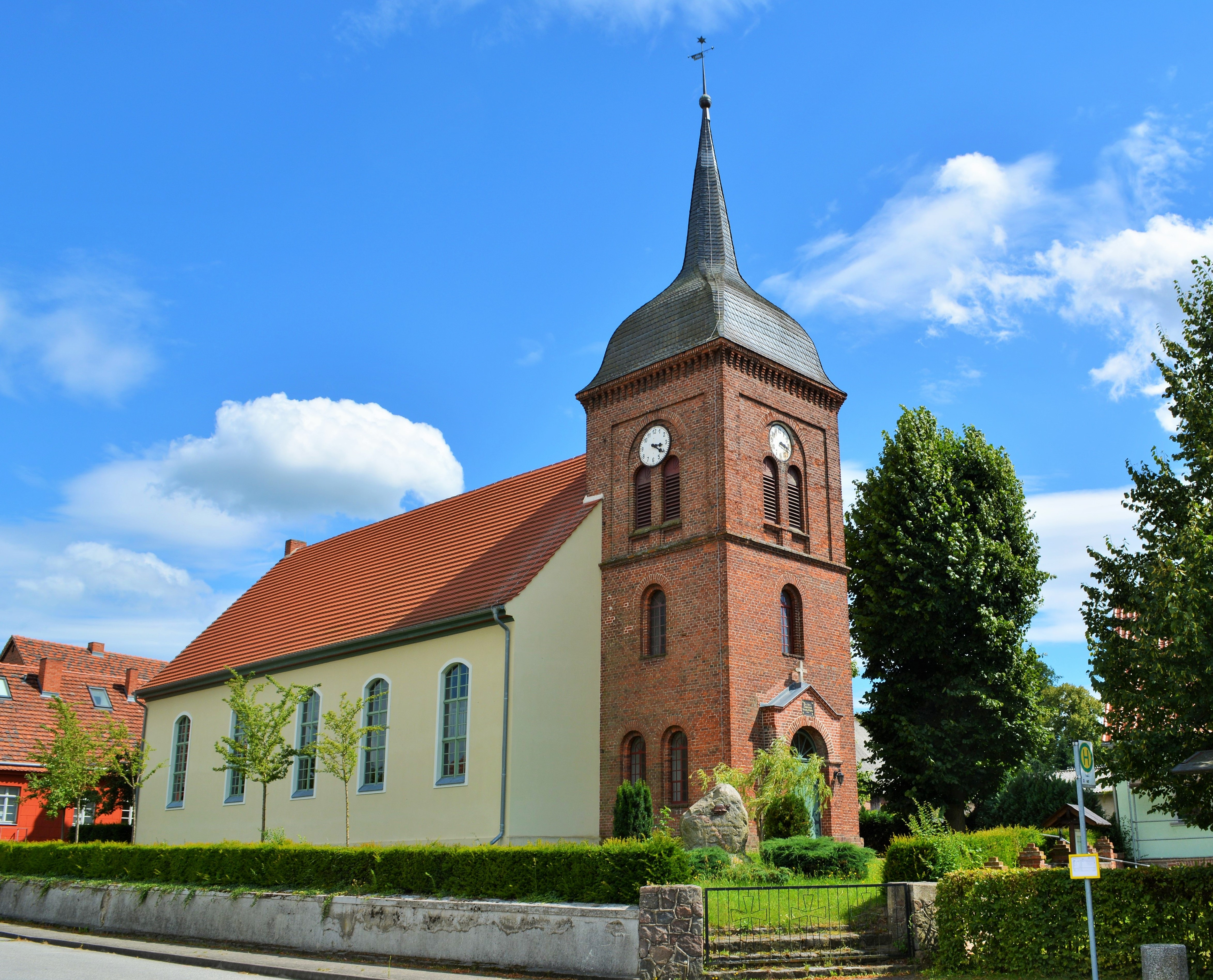 Denkmalgeschützte Dorfkirche in Kleßen, Landkreis Havelland